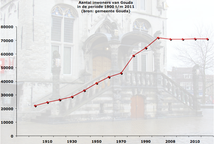 Bevolking van Gouda (gemeente) 1900 t/m 2011, eerste versie van 2009 aangevuld met de gegevens van de volgende jaren